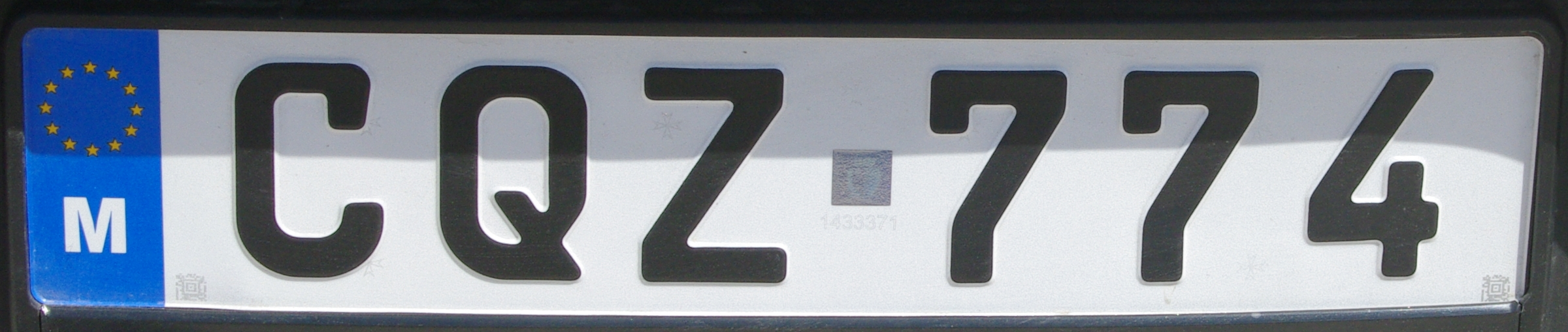 Kentekenplaat uit Malta